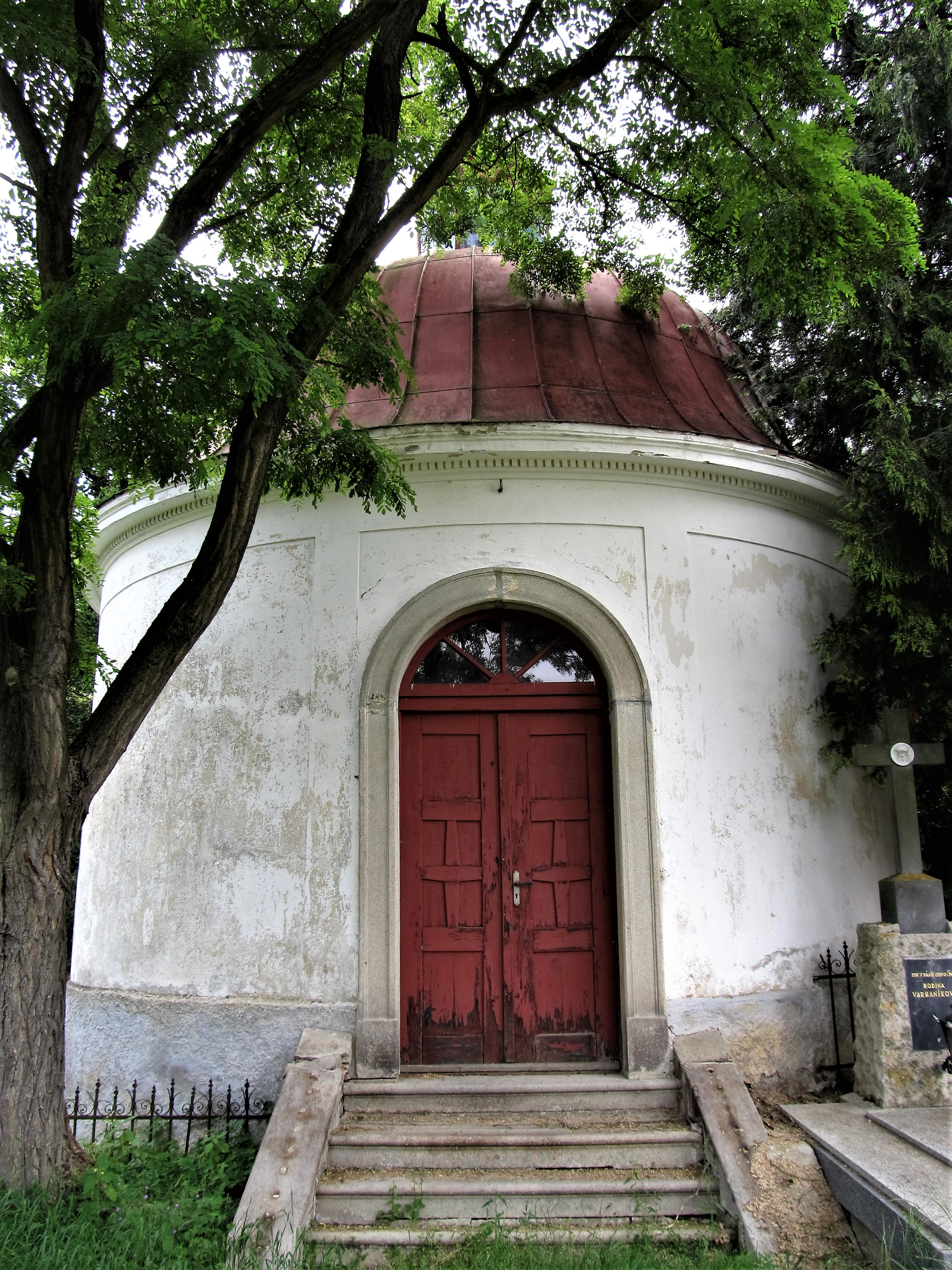 Hrobka Ugartů na hřbitově v Jevišovicích